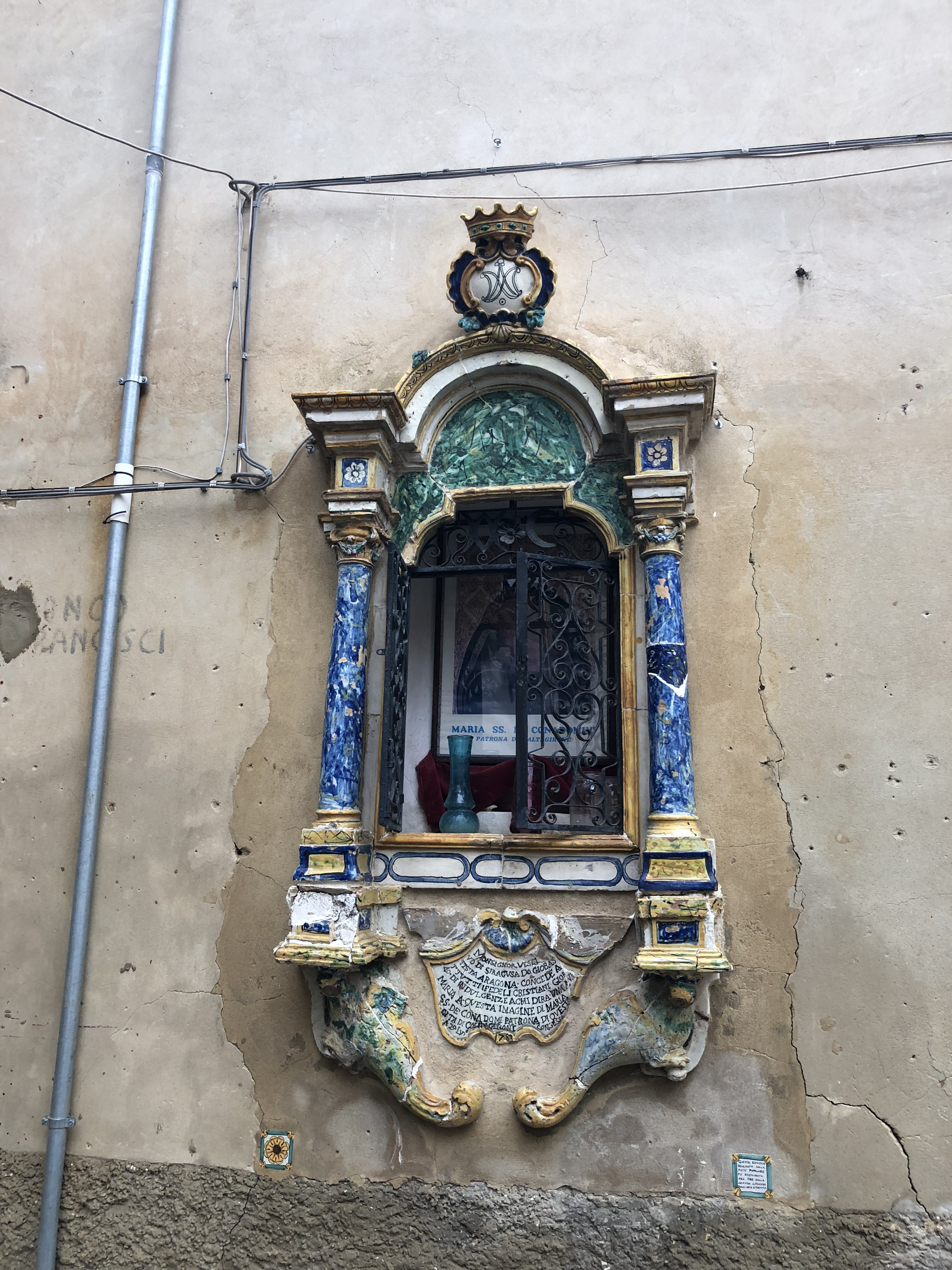 Edicola, Caltagirone